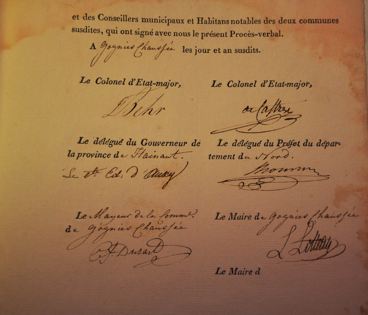 Signataire du Procès-Verbal de partage de Goegnies Chaussée